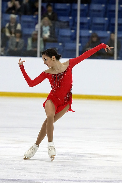 Евгения Медведева на Autumn Classic International 2018 - Произвольная программа